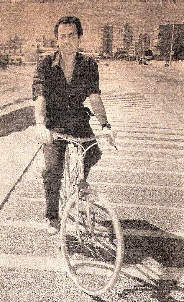 Aldo Sessa en mar del plata, 1983